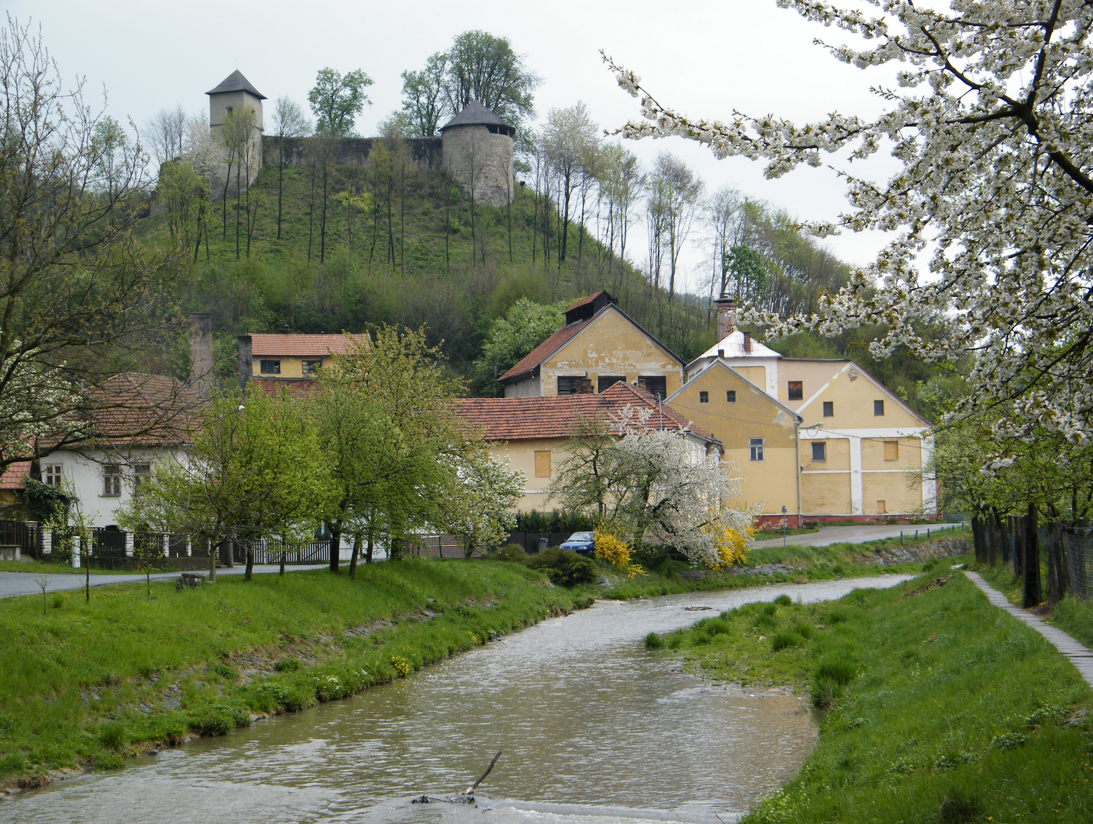 Brumov-Bylnice Brumovka River and Castle Brumov